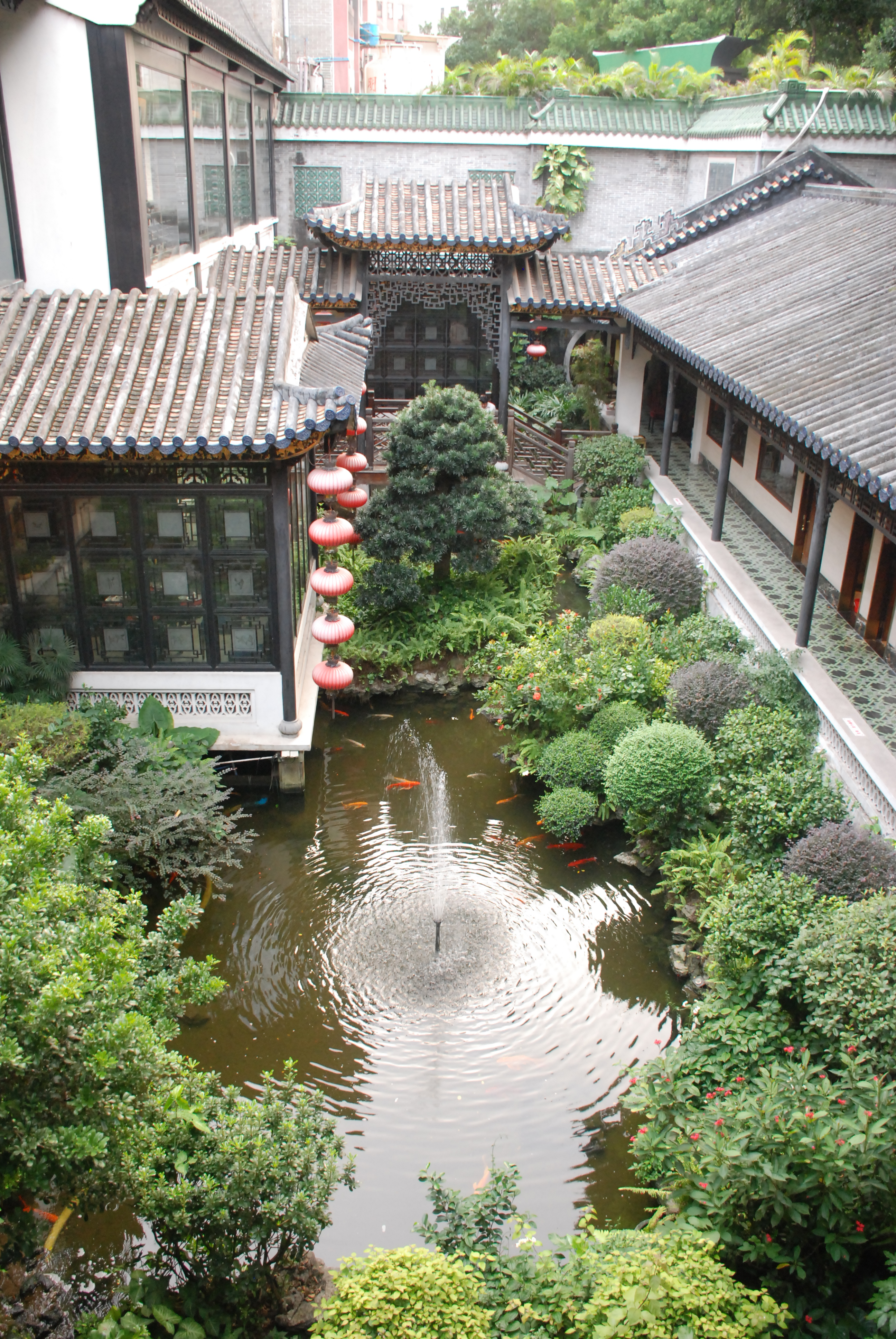 中文（中国大陆）: 北园酒家庭园。2015年8月19日公布为广州市文物保护单位。